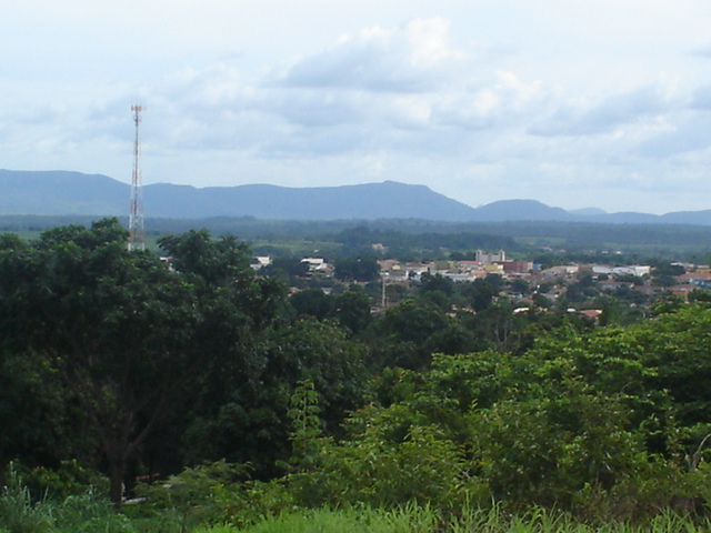 FOTO DA CIDADE DE XINGUARA VISATA DO MORRO DAS TORRES